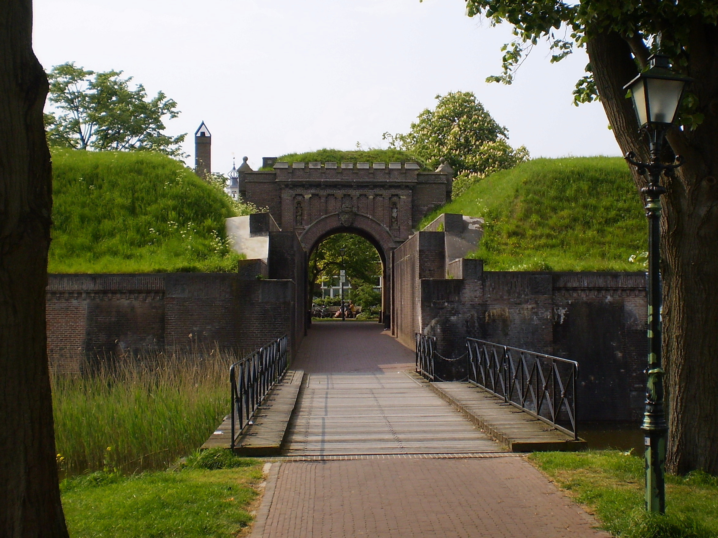 De Utrechtse Poort in Naarden